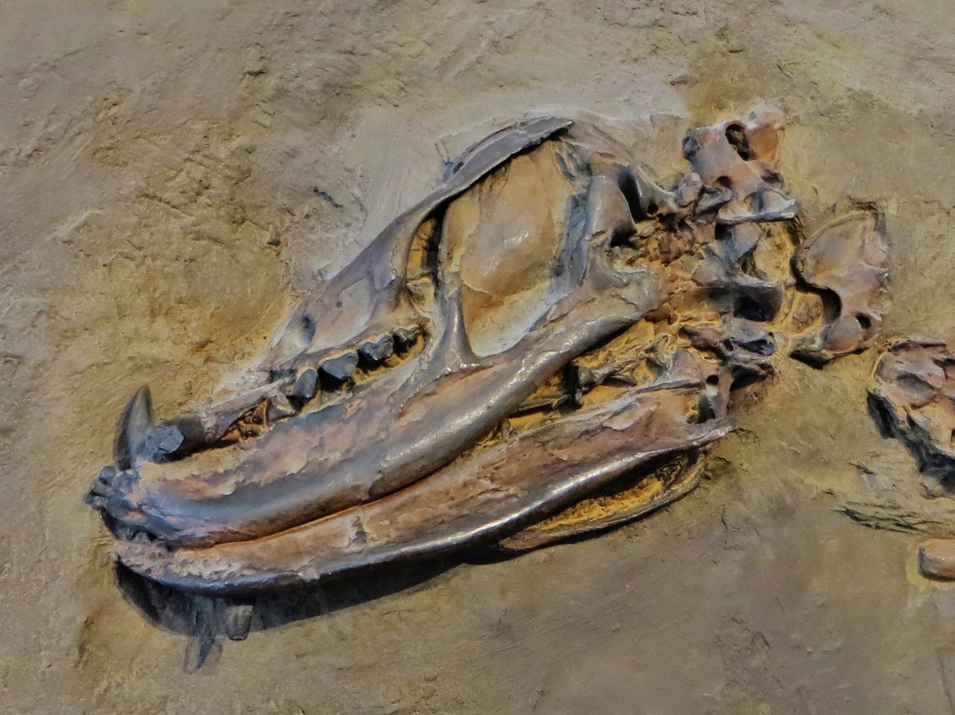 Fossil of Kopidodon - Took the picture at Natural History Museum, Luzern